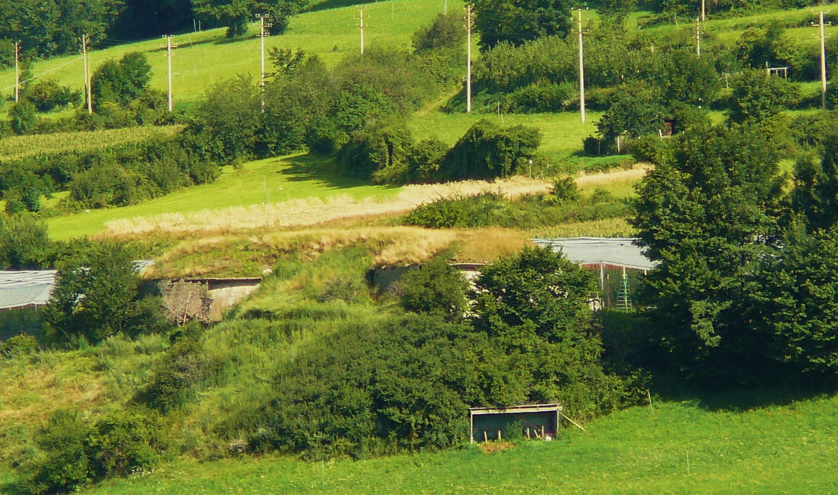 Opera 22, malles